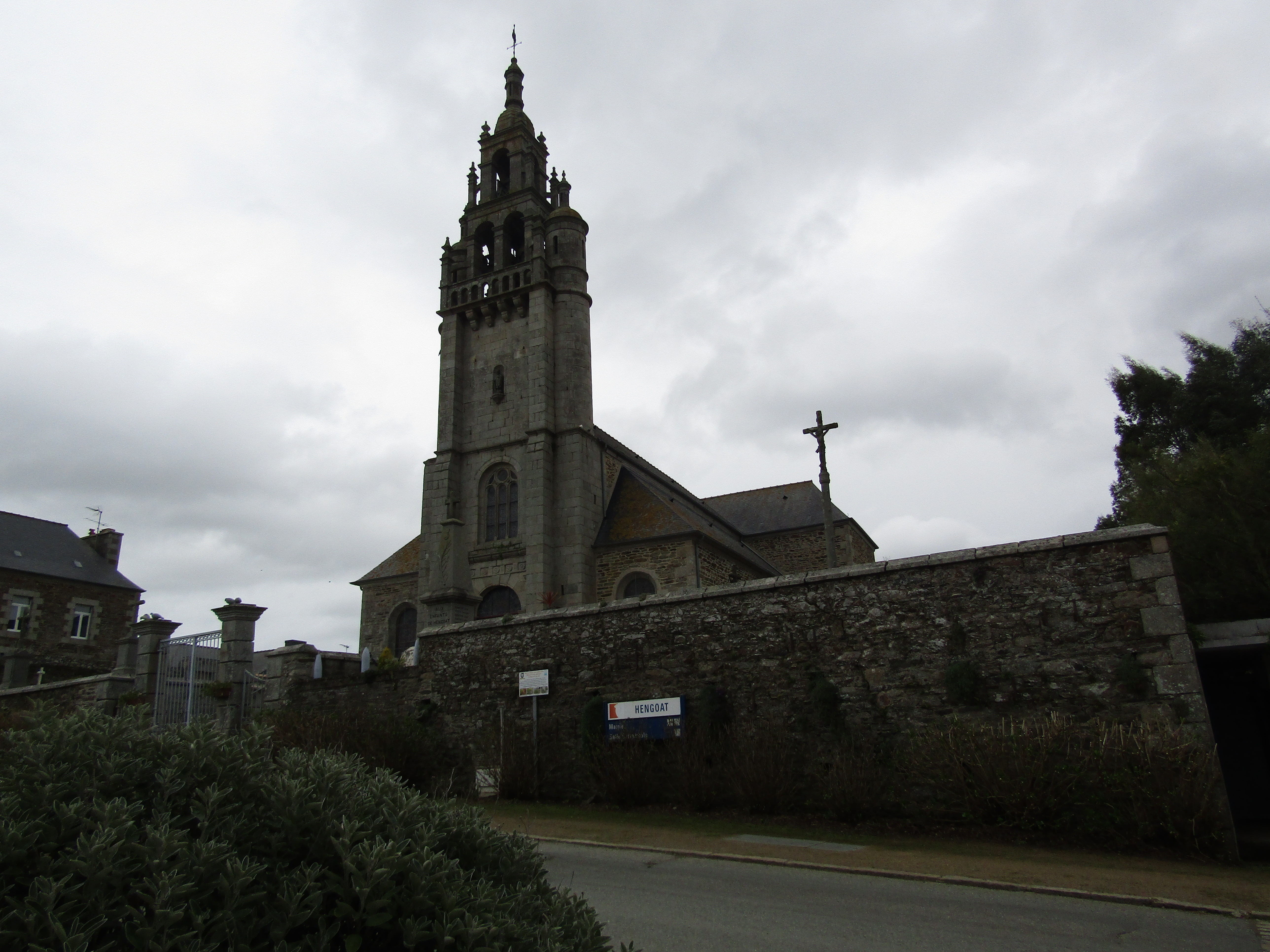 Église Saint-Maudez d'Hengoat